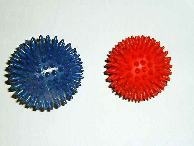 selbst fotograffiert am 10.10.04. PD und GNUFDL.Bild: Massagebälle Lizenz